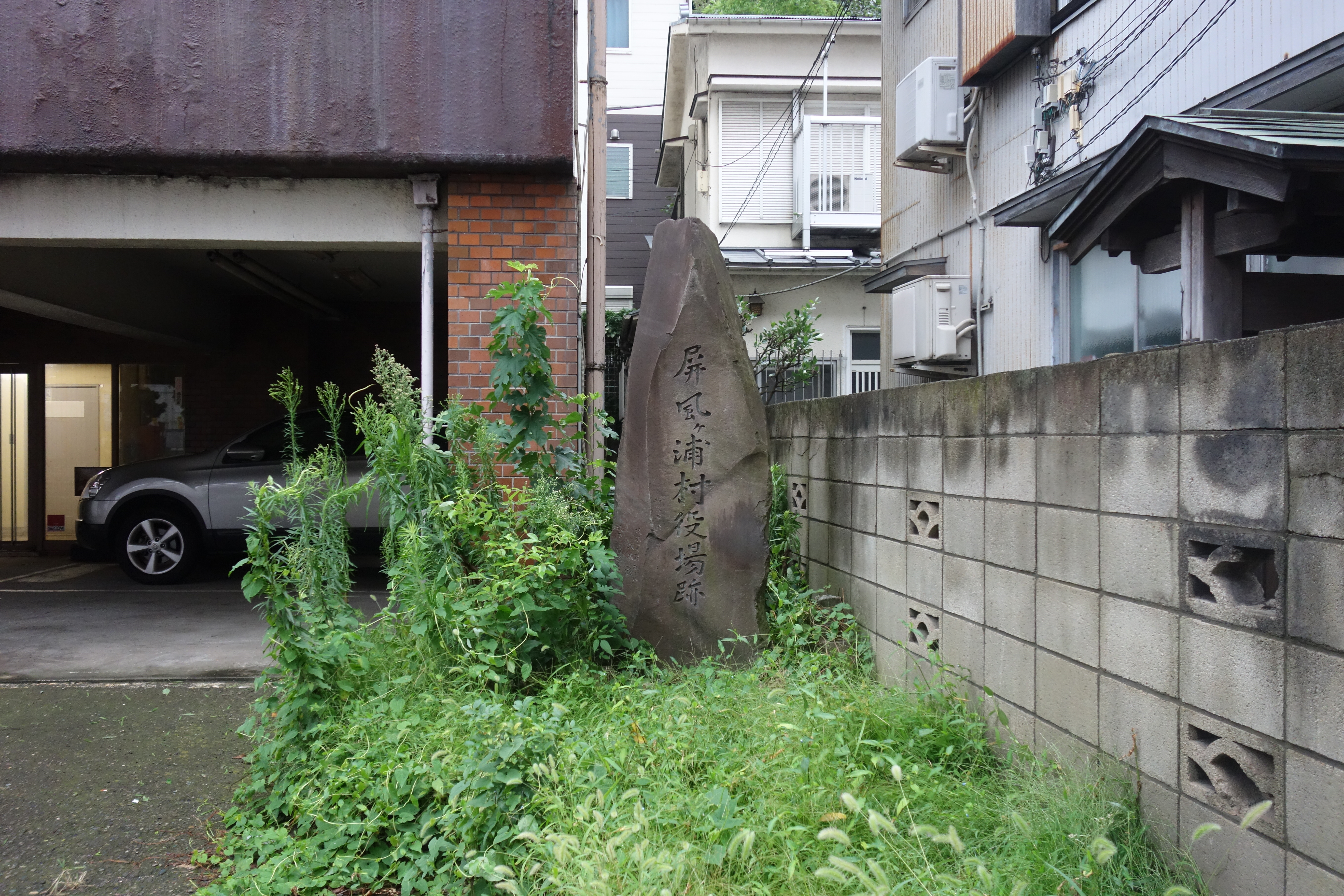 屛風ヶ浦役場跡をあらわす石碑（神奈川県横浜市磯子区森２－１－１３）